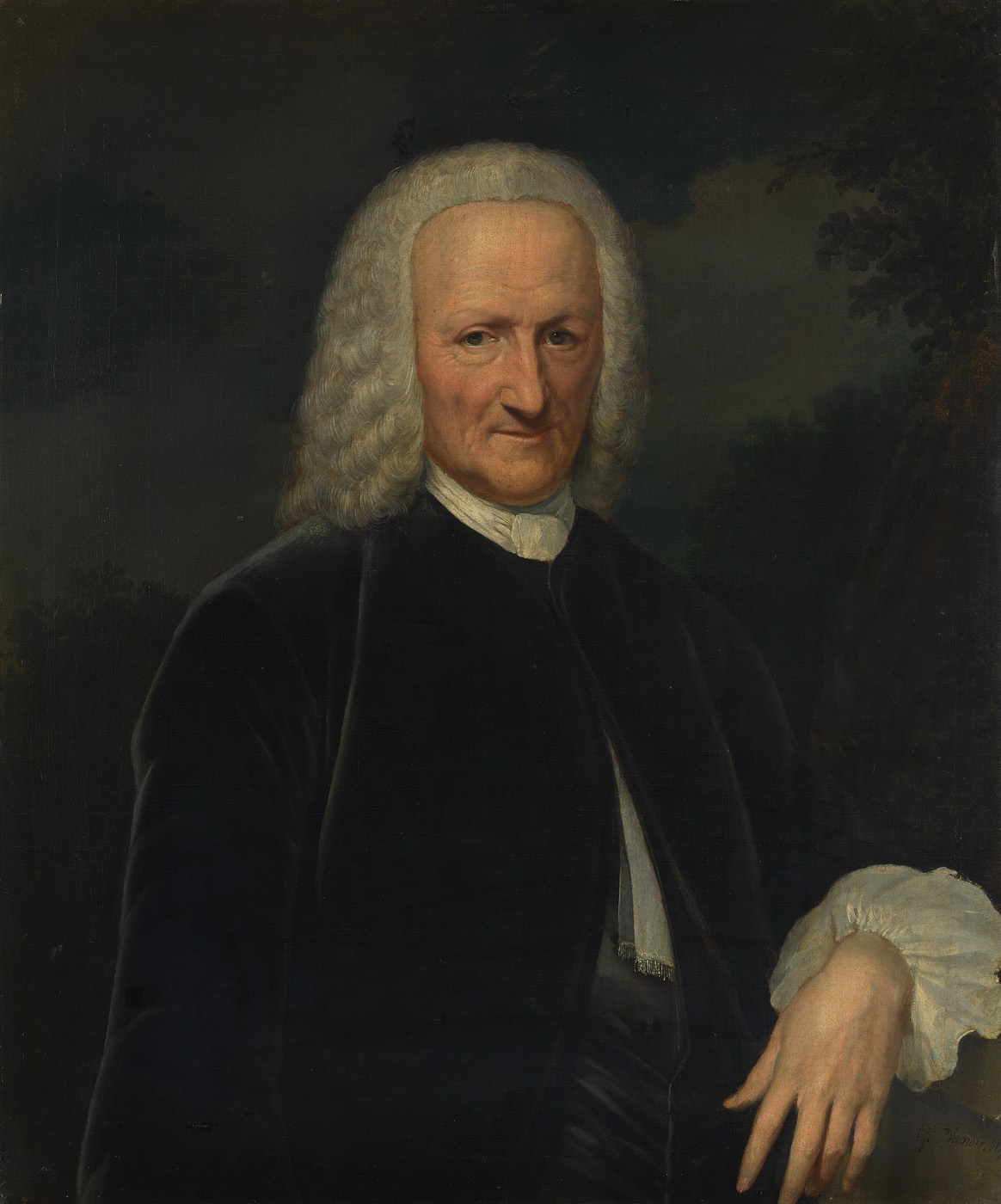 schilderij; portret; portret Amsterdam; mansportret; Backer, Willem Dirksz.